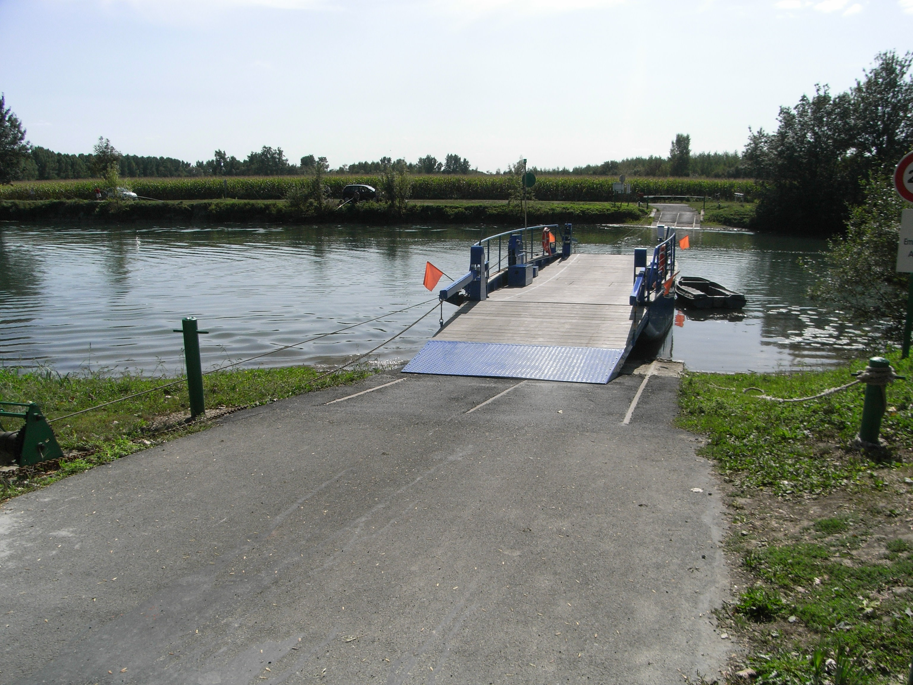 Le "Châ p'tit va loin", dernier bac à chaîne français à manoeuvres manuelles sur la Charente entre Dompierre-sur-Charente et Rouffiac (Charente-Maritime).